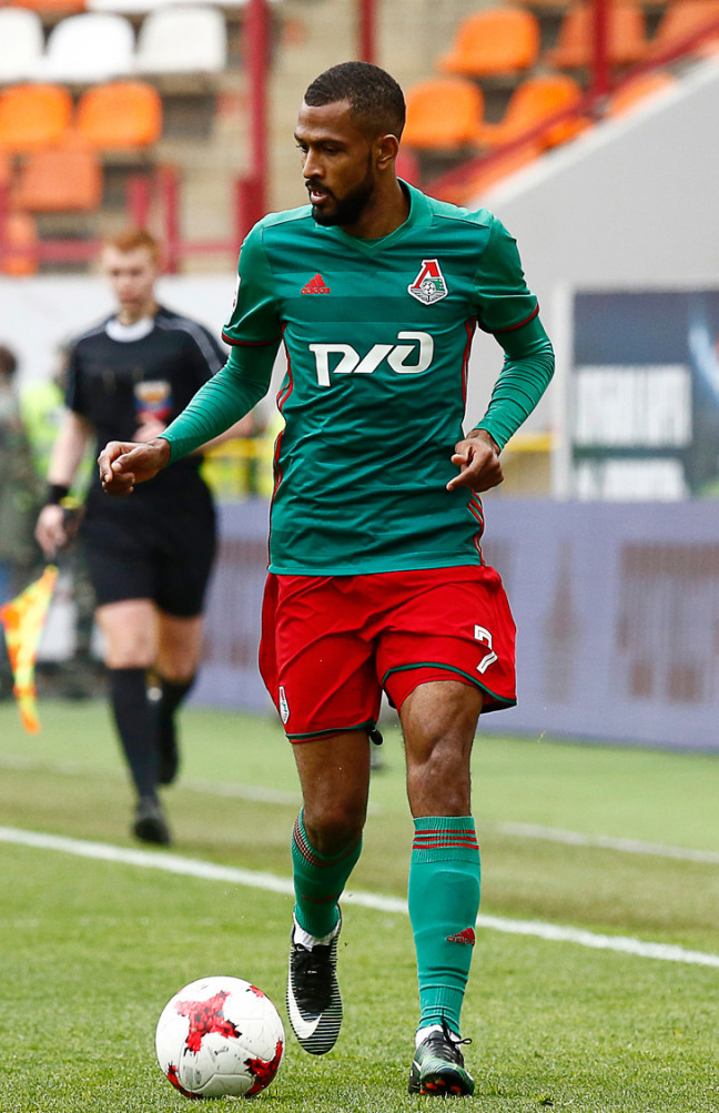 «Локомотив» - «Зенит»